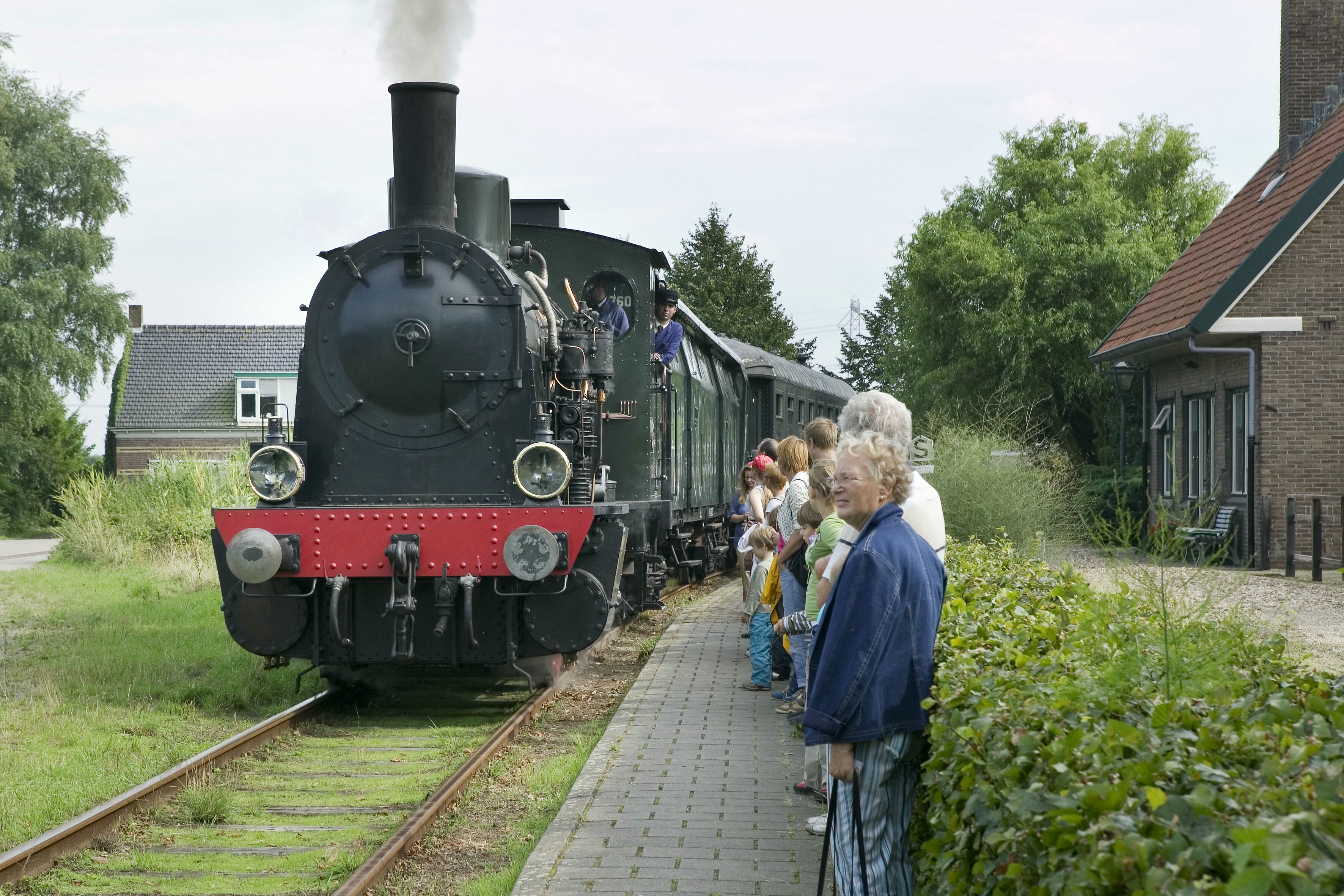 Spoorbaantraject Van De Spoorwegremise In Goes Naar Oudelande: Overzicht van het voormalige station van Kwadendamme met arriverende locomotief op de museumspoorlijn, gelegen aan het spoorbaantraject van de spoorwegremise in Goes naar Oudelande